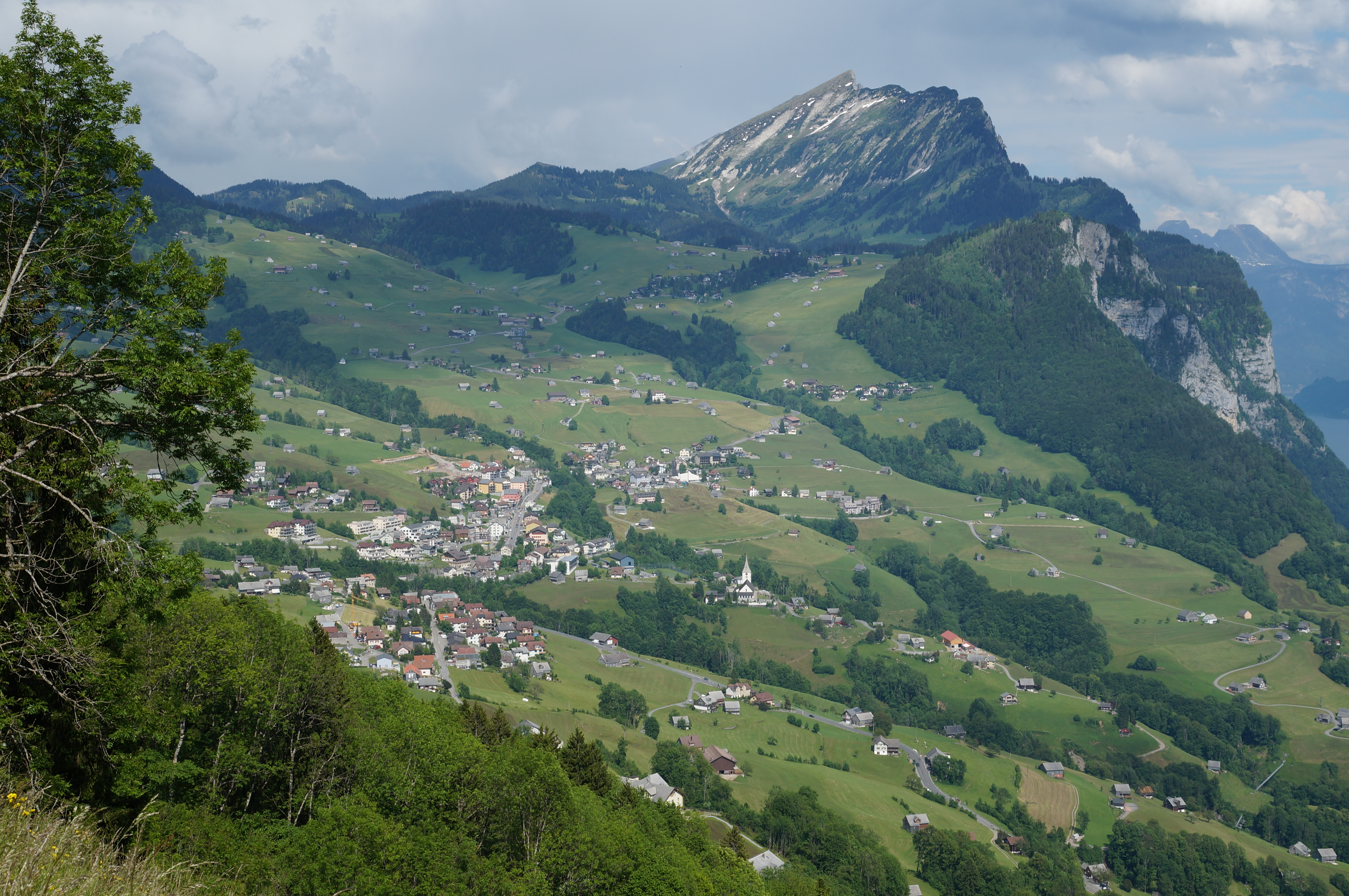 Amden von Durschlegi. Leistkamm im Hintergrund.